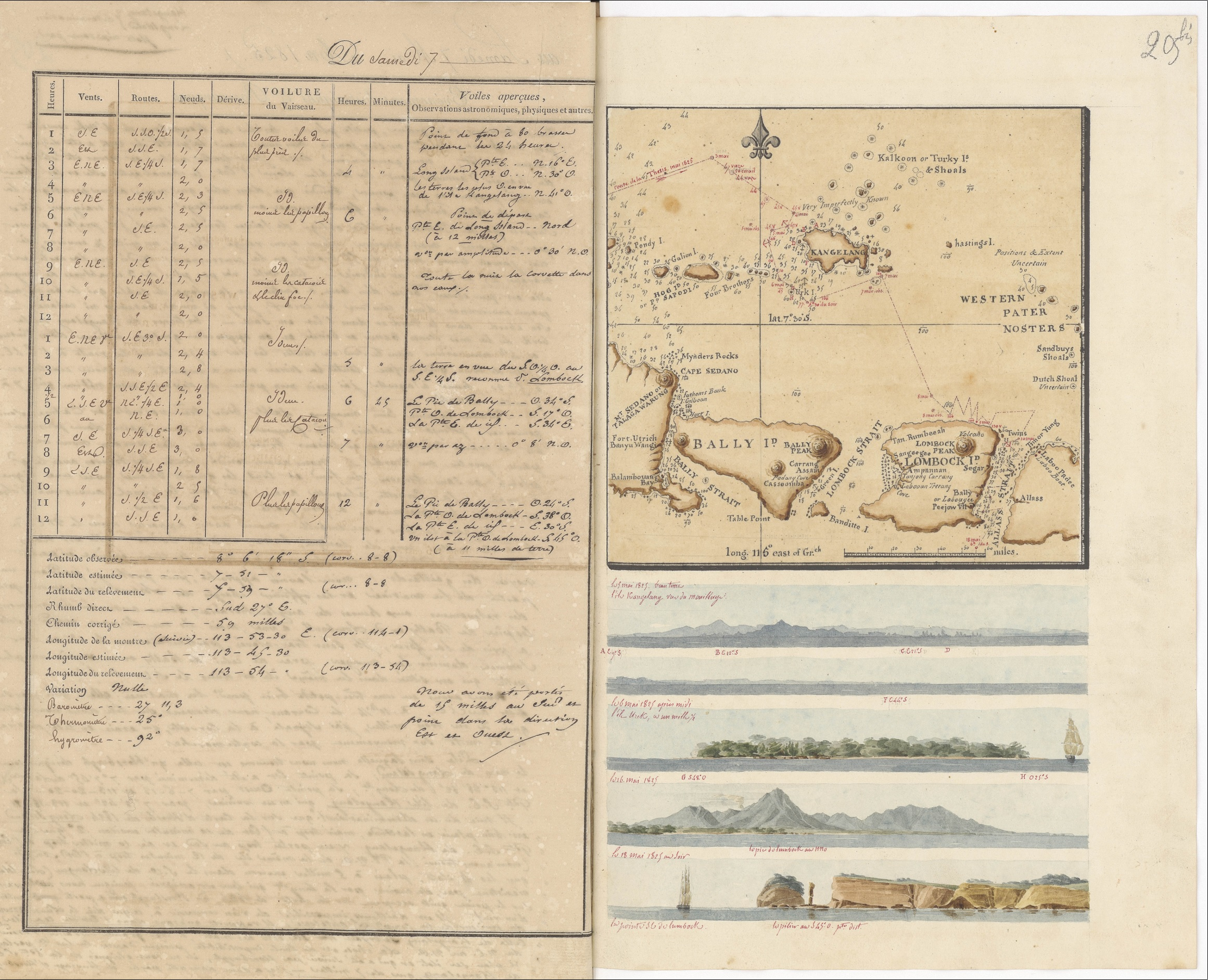 Journal de bord de l'expédition de Bougainville sur La Thétis et L'Espérance, page avec une carte manuscrite des îles de Bali et de Lombok